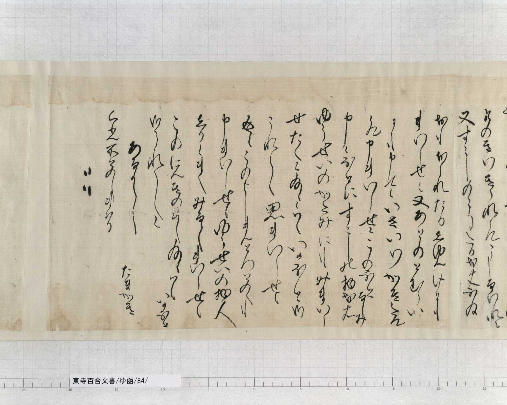 東寺百合文書ゆ函84文書名たまかき書状并備中国新見庄代官祐清遺文03